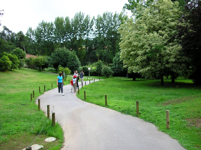 "Parque Biológico" in Vila Nova de Gaia, Portugal